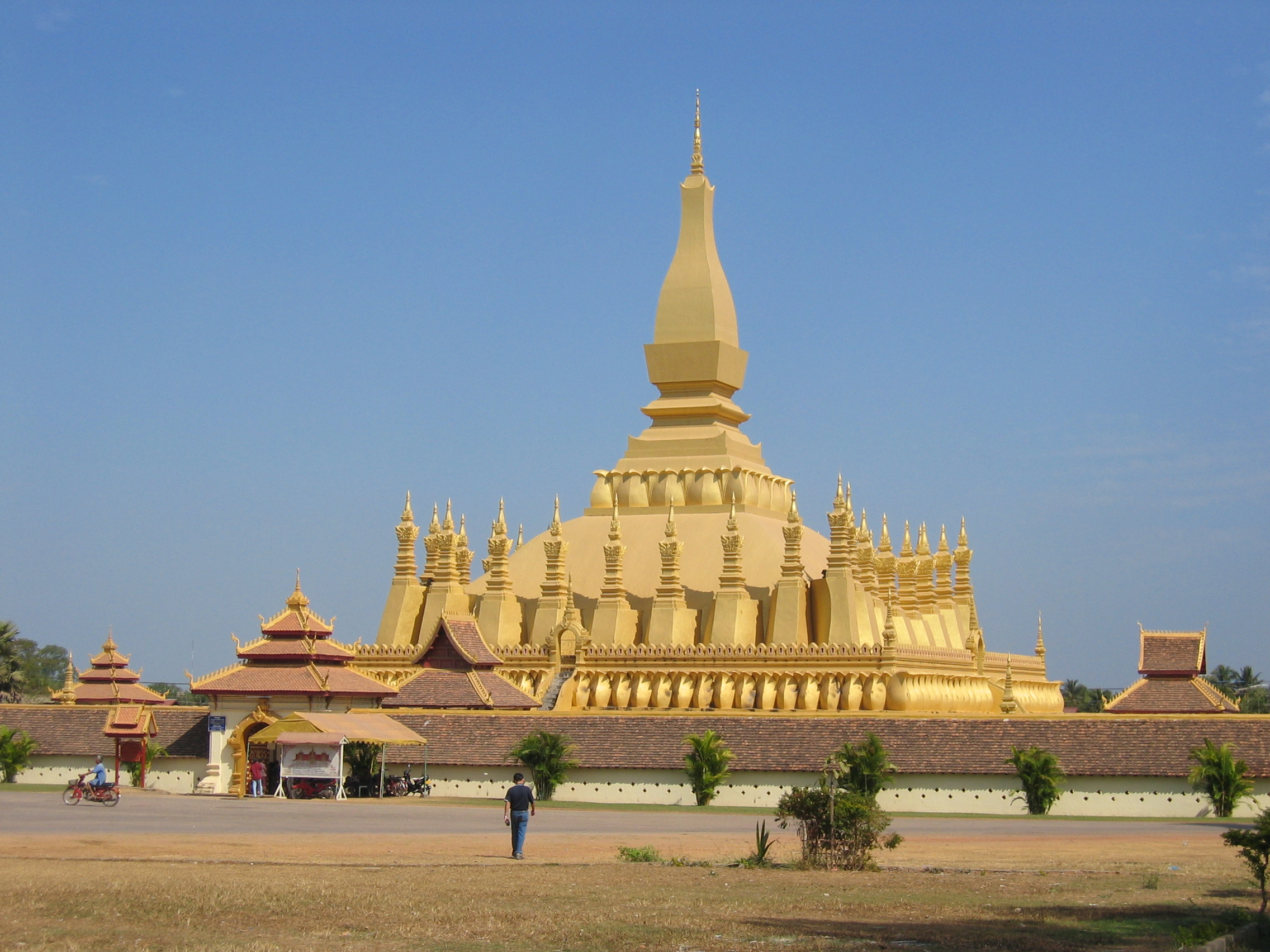 Tempel Pha That Luang Vientiane Laos